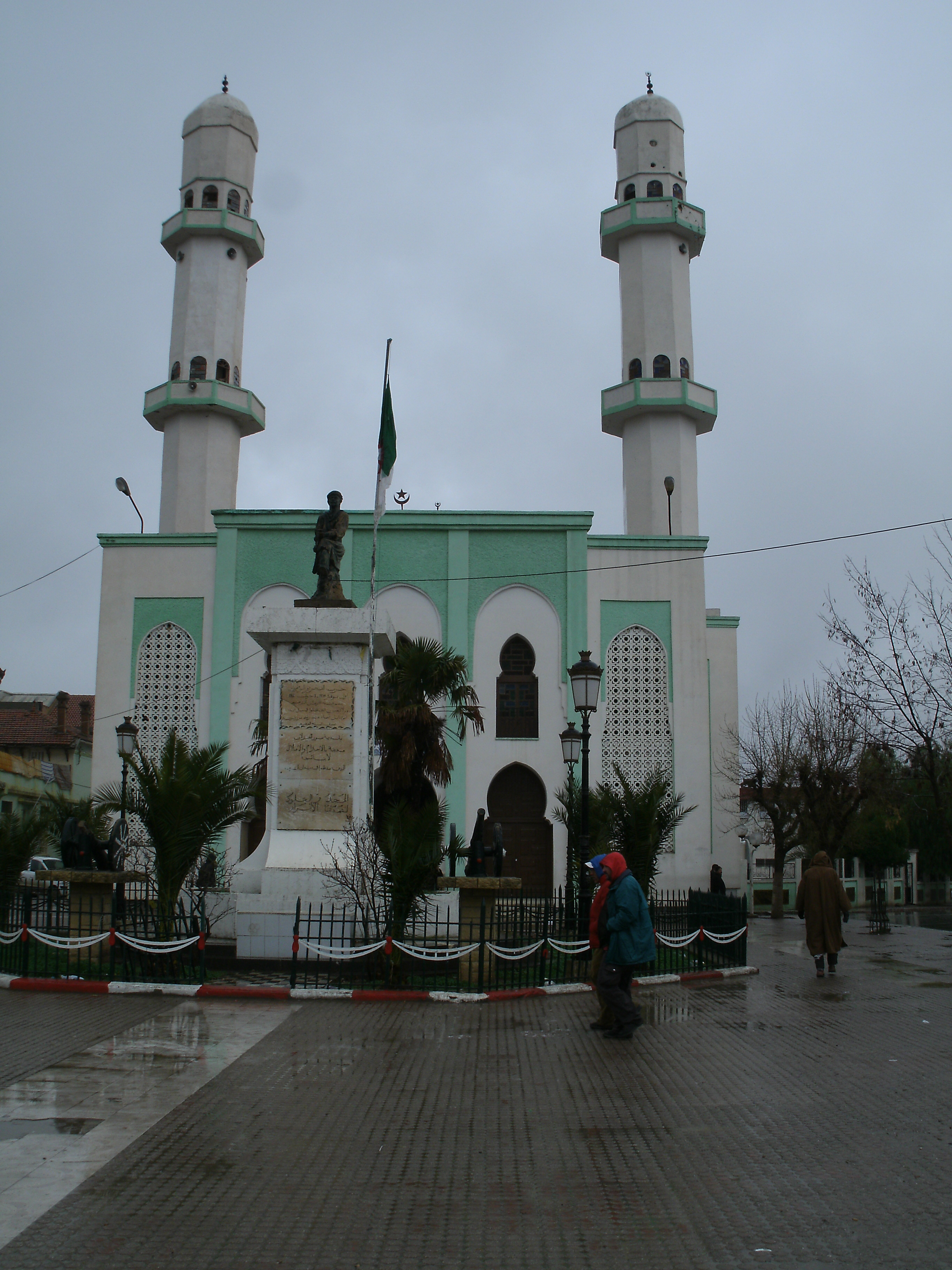 La place et la mosquée de Sour el Ghozlane